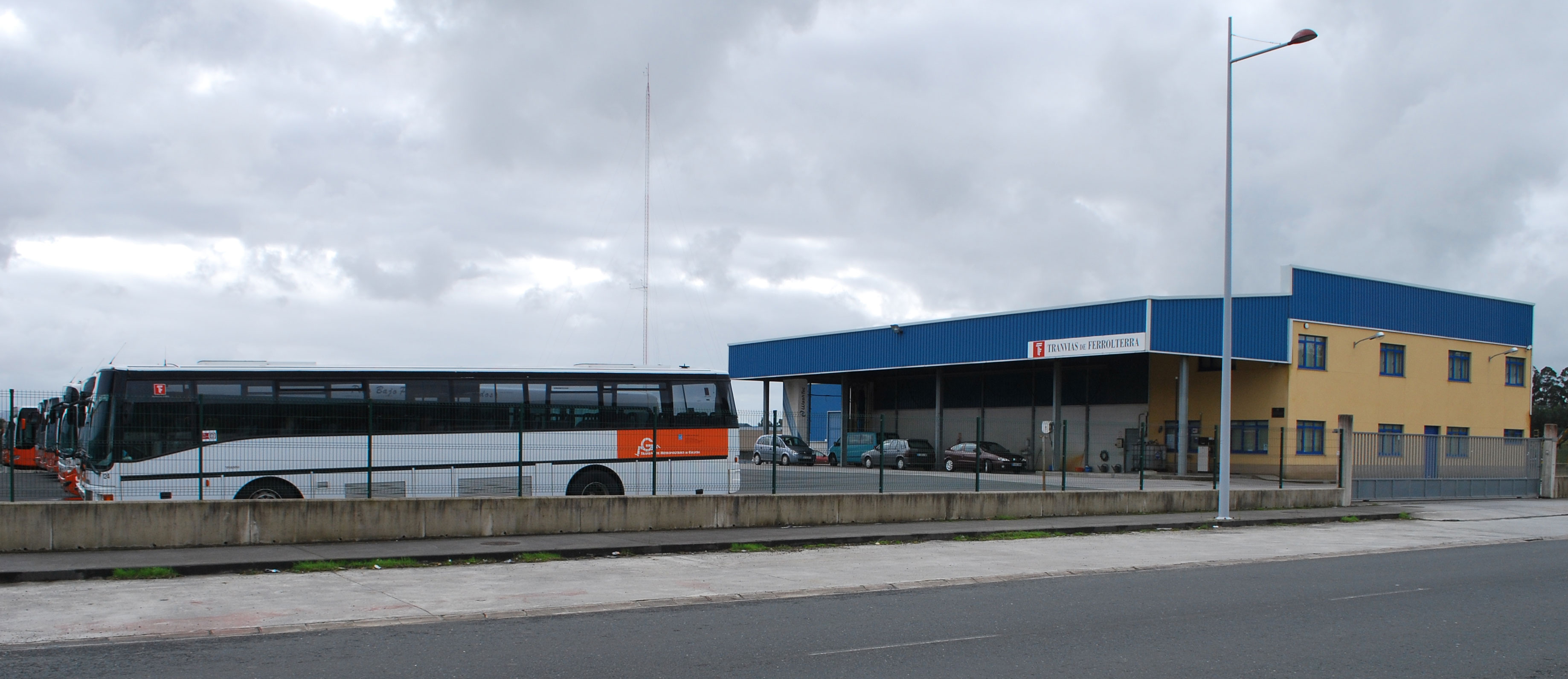 Sede de Tranvías del Ferrol en Río do Pozo Narón A Coruña